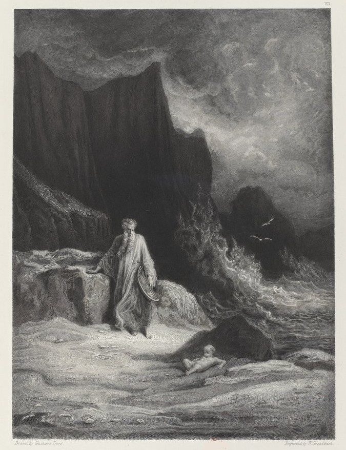 «Alors fut trouvé un enfant nu sur les sables du sombre Dundagil, à côté de la mer de Cornouailles. C'était Arthur», dessin de Gustave Doré pour illustration du poéme "Genièvre" de Alfred Tennyson